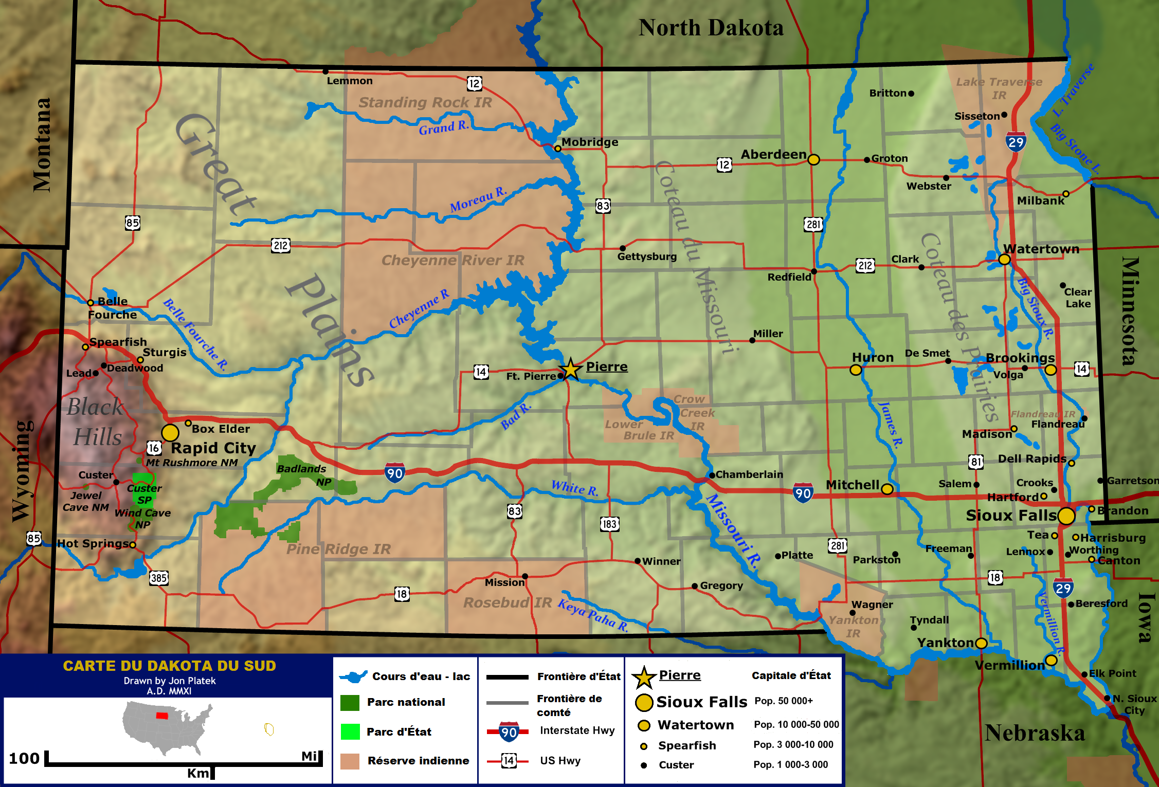 Carte générale du Dakota du Sud - description originale = General map of the US state of South Dakota. Shown are the state's topography, major cities and roads, boundaries, and bodies of water.